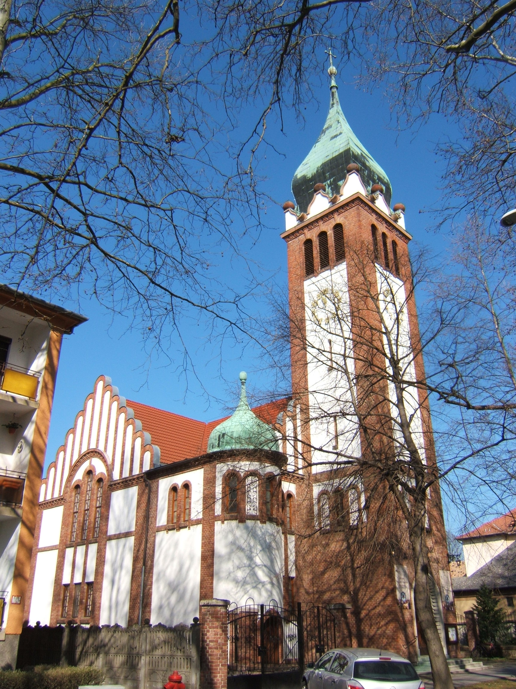 A kaposvári evangélikus templom 2016-ban